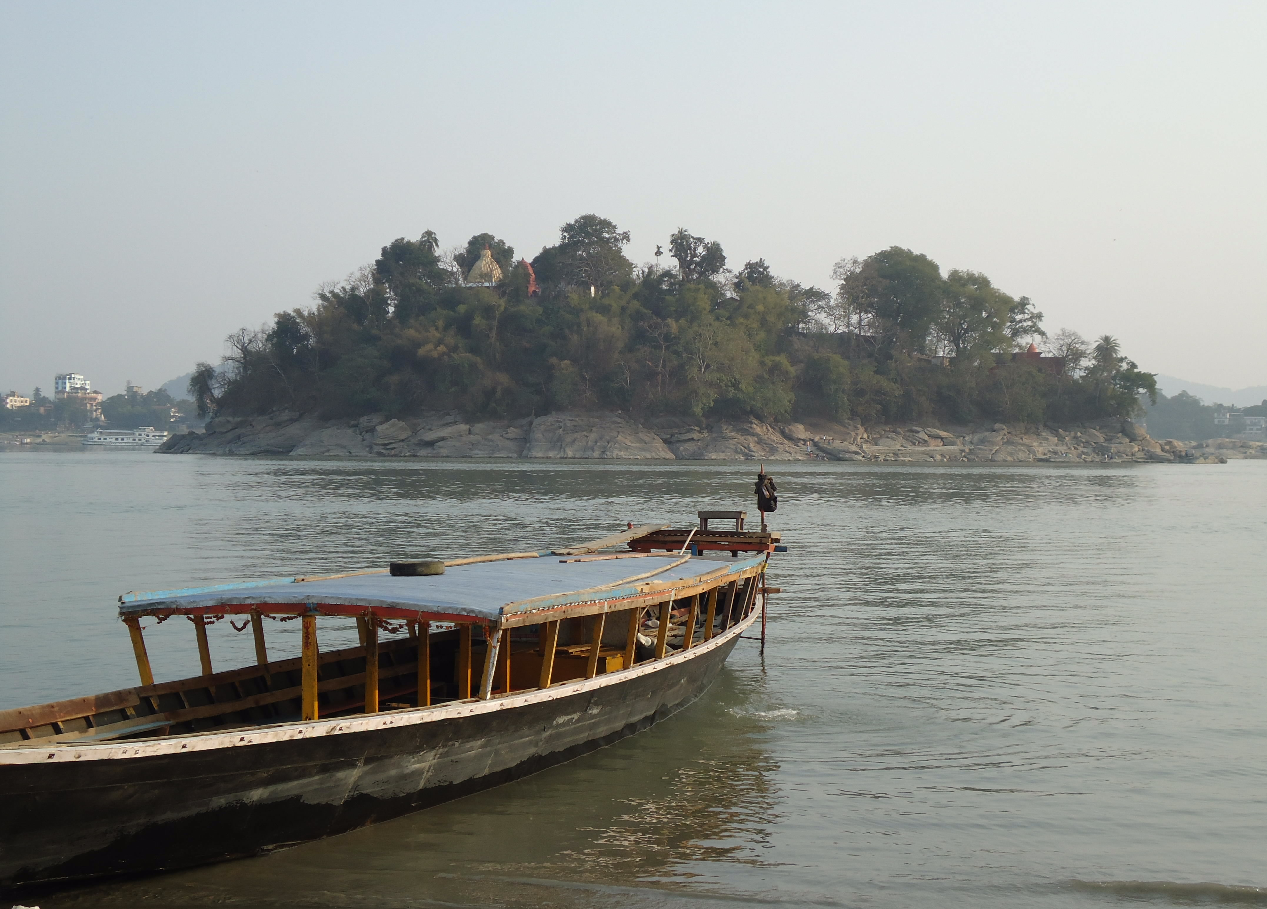 অসমীয়া: উমানন্দলৈ যোৱাৰ পথত এখন ফেৰী